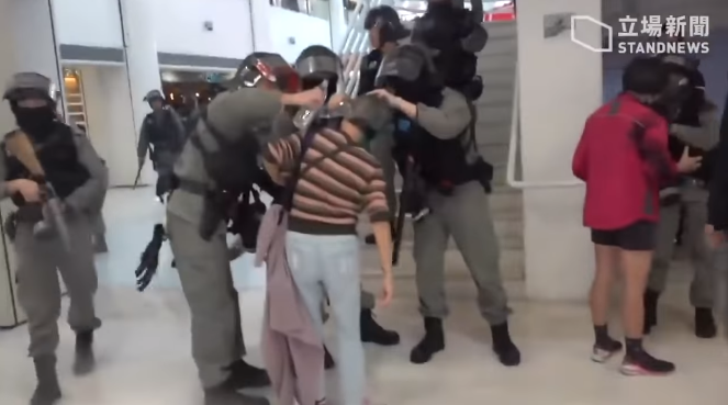 2019年12月26日「和你 SHOP 蒙面日」期間，有商場內的長者被警察噴藍色的胡椒噴霧